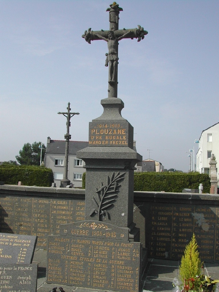 Monument aux morts - Plouzané-29